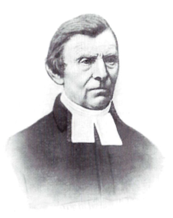 Porträtfotografie von Pastor Heinrich Wolf (1801–1887)